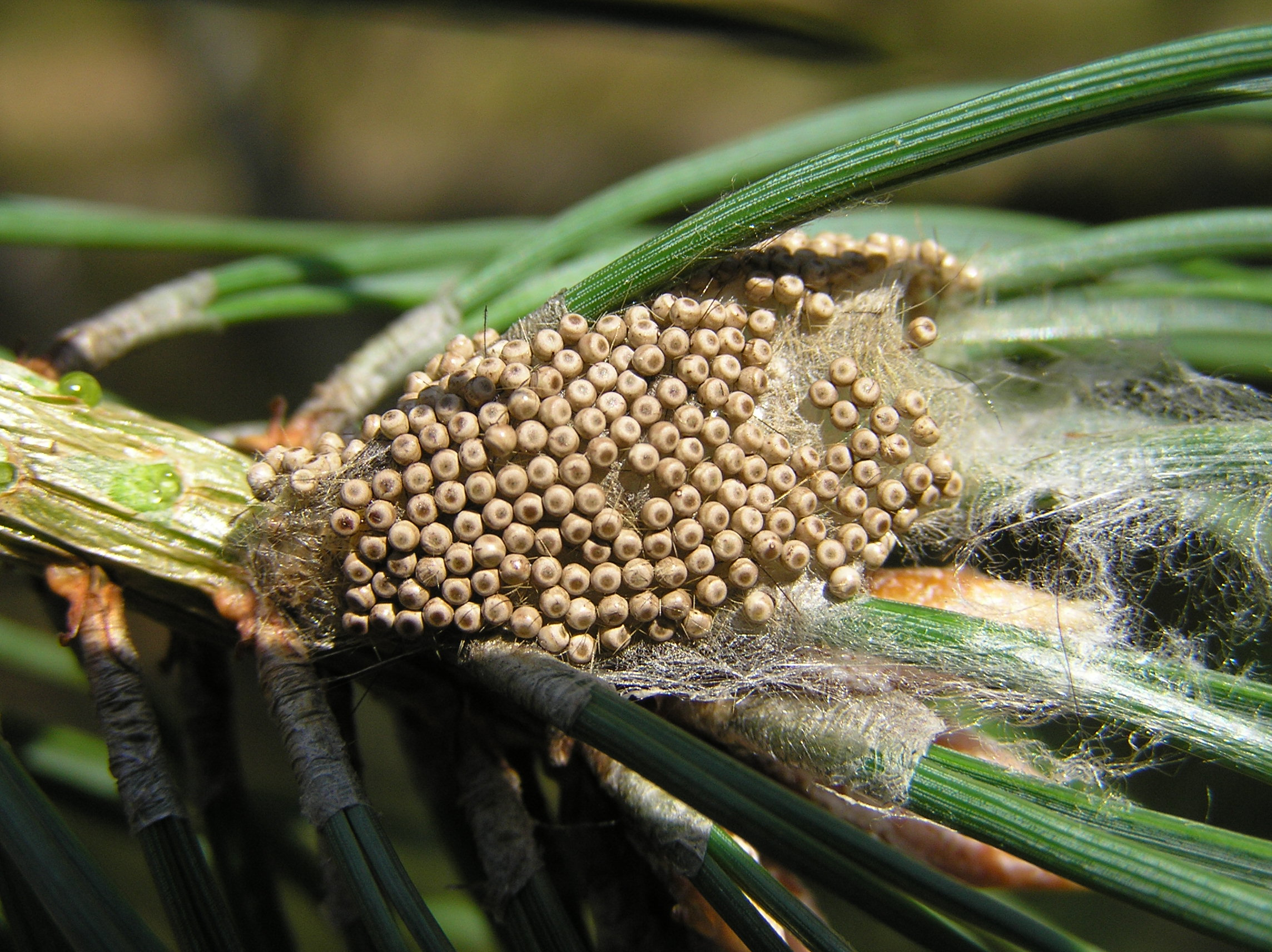 Orgyia antiqua, Znamionówka tarniówka, Polska